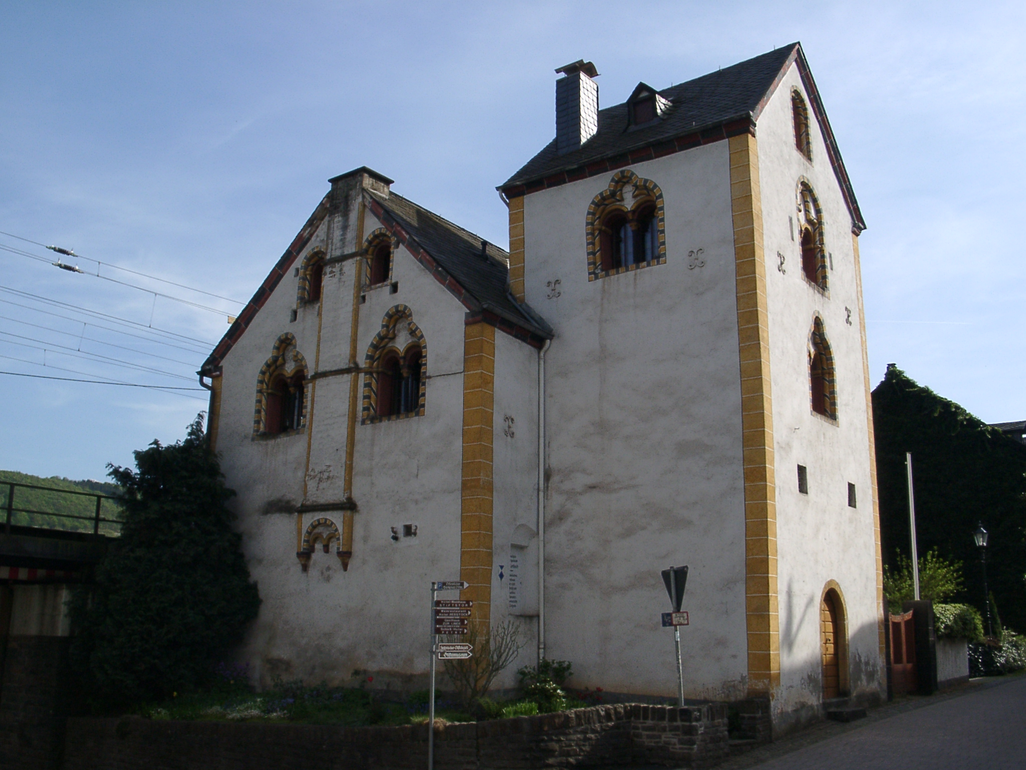 Propsteigebäude (Korbisch) in Karden